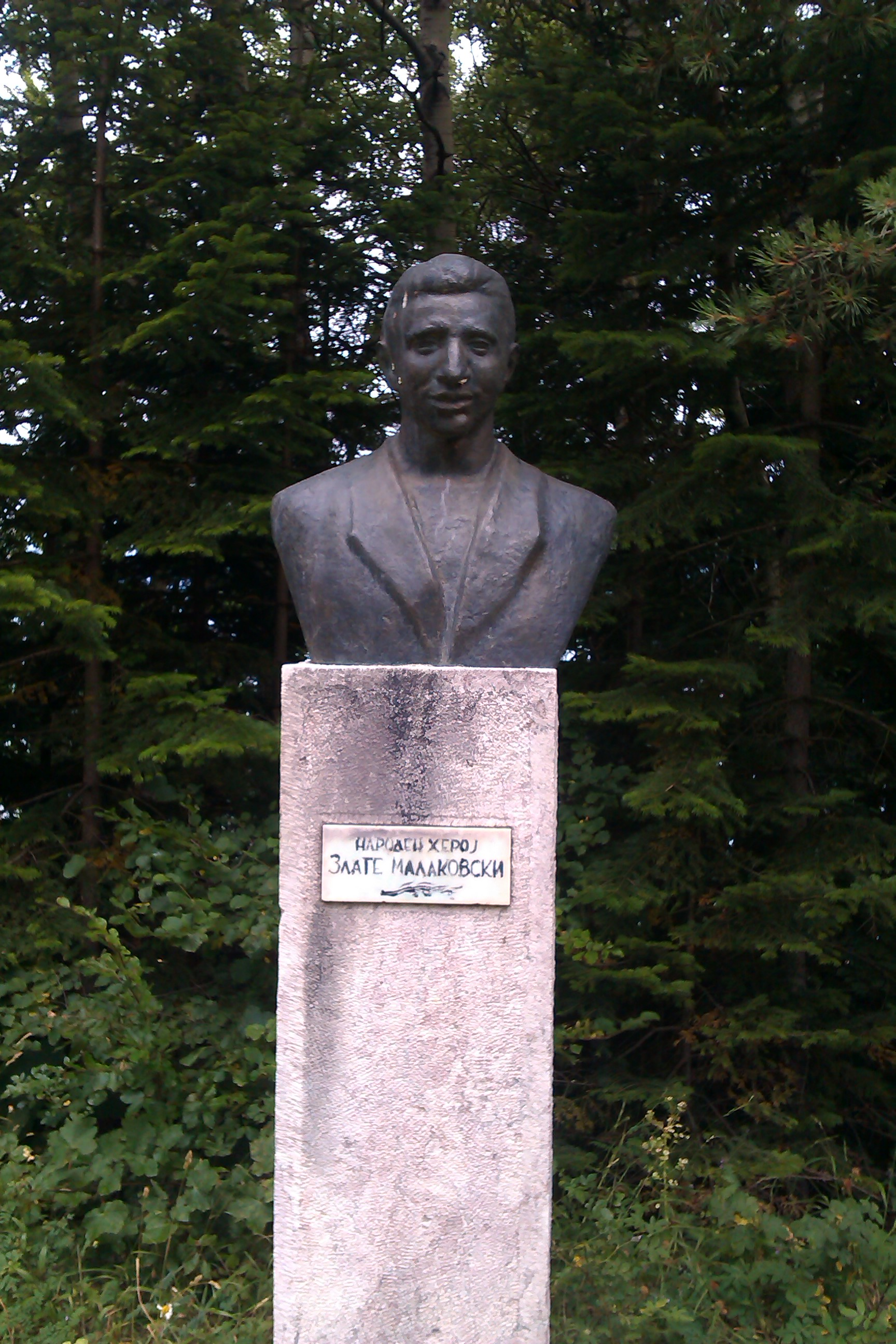 Биста на Злате Малаковски во Маврови Анови